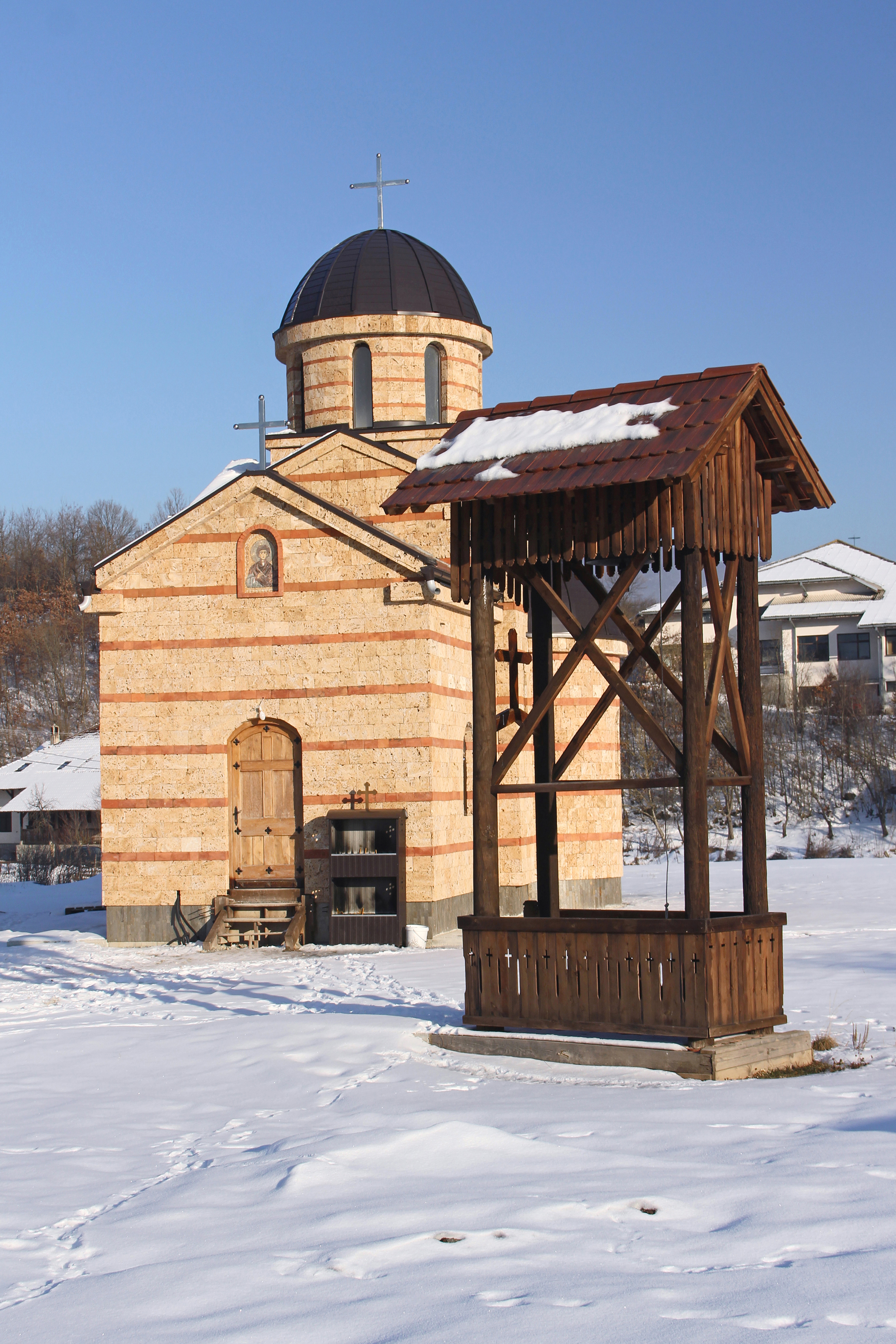 Brđani kod Gornjeg Milanovca, Crkva Svetog Pantelejmona